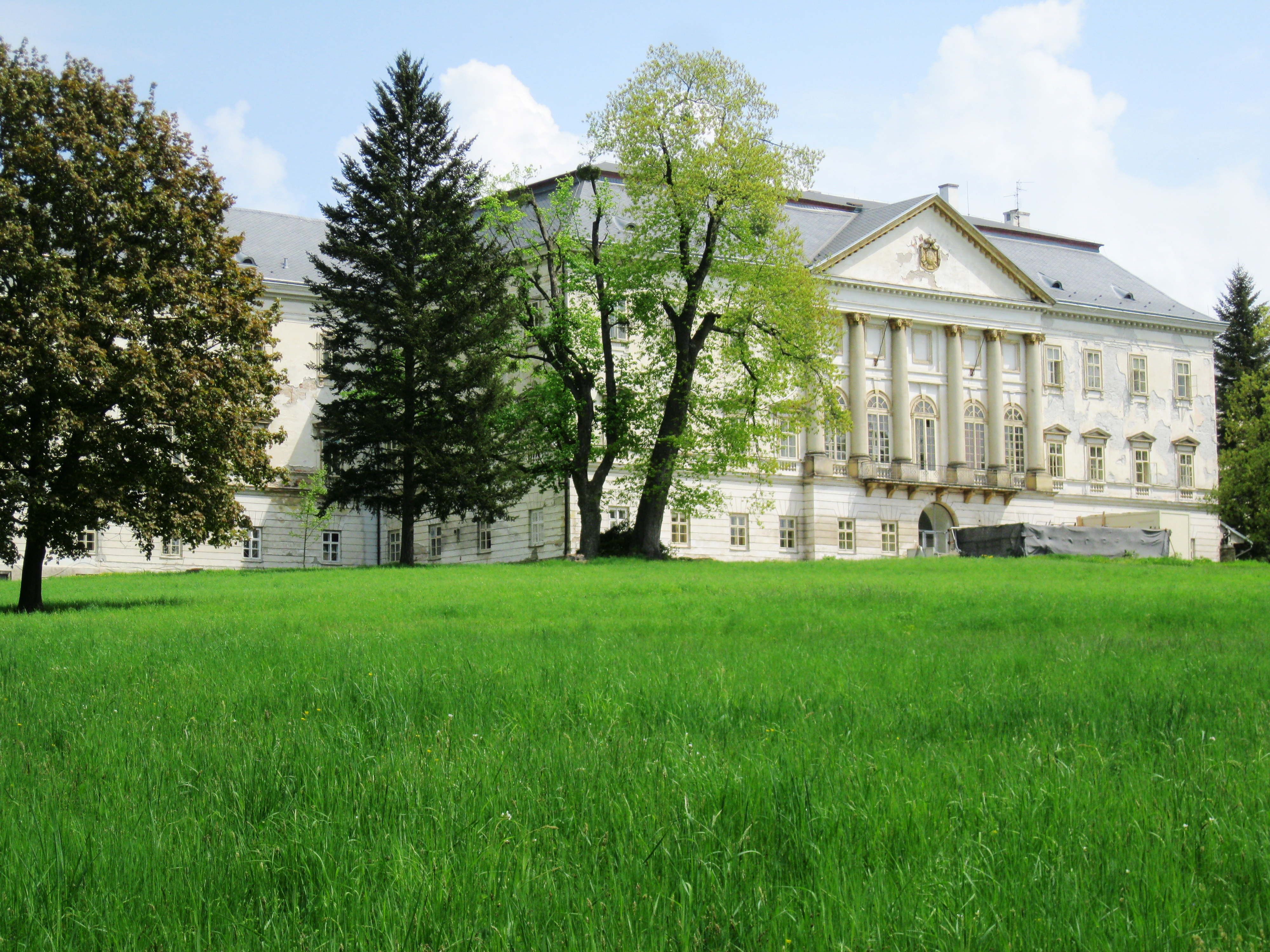 Zámek Mladeč, Nové Zámky 2, Mladeč